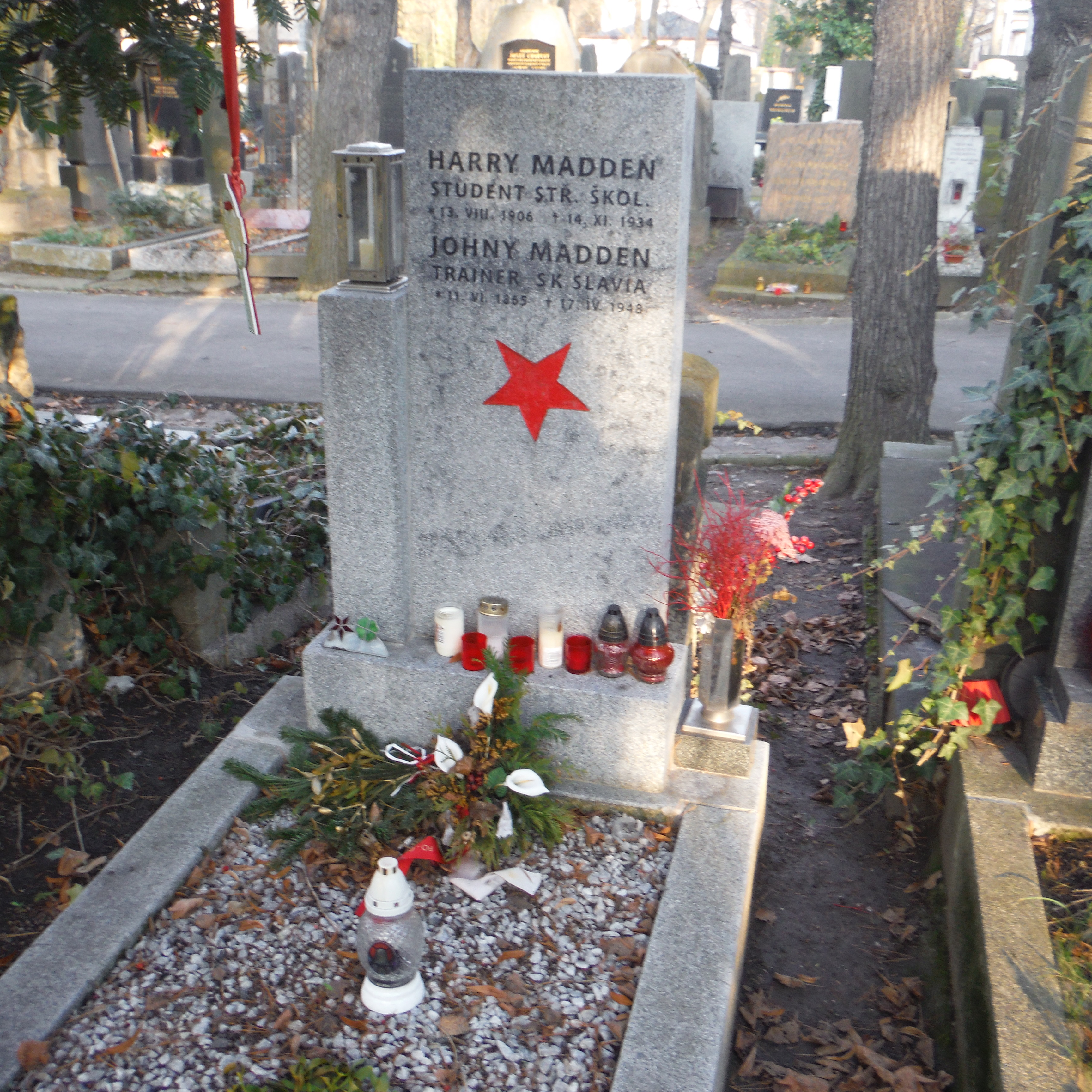 hrob